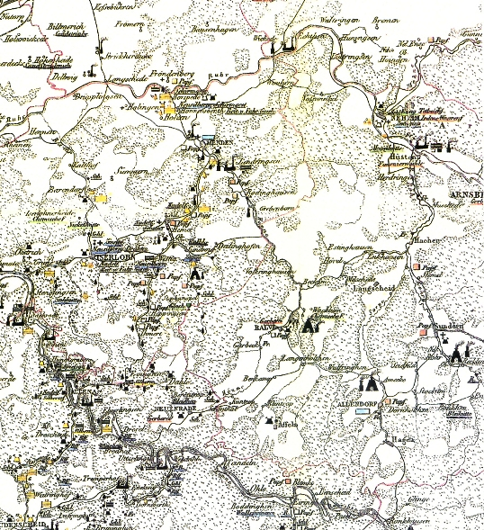 Ausschnitt Gewerbekarte Regierungsbezirk Arnsberg (Jacobi 1855)